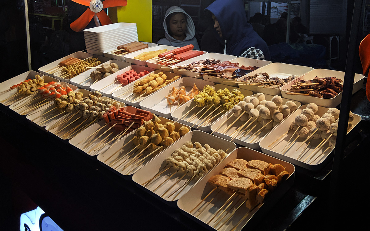 Sate lok-lok di sekitaran alun-alun Batu, Jawa Timur